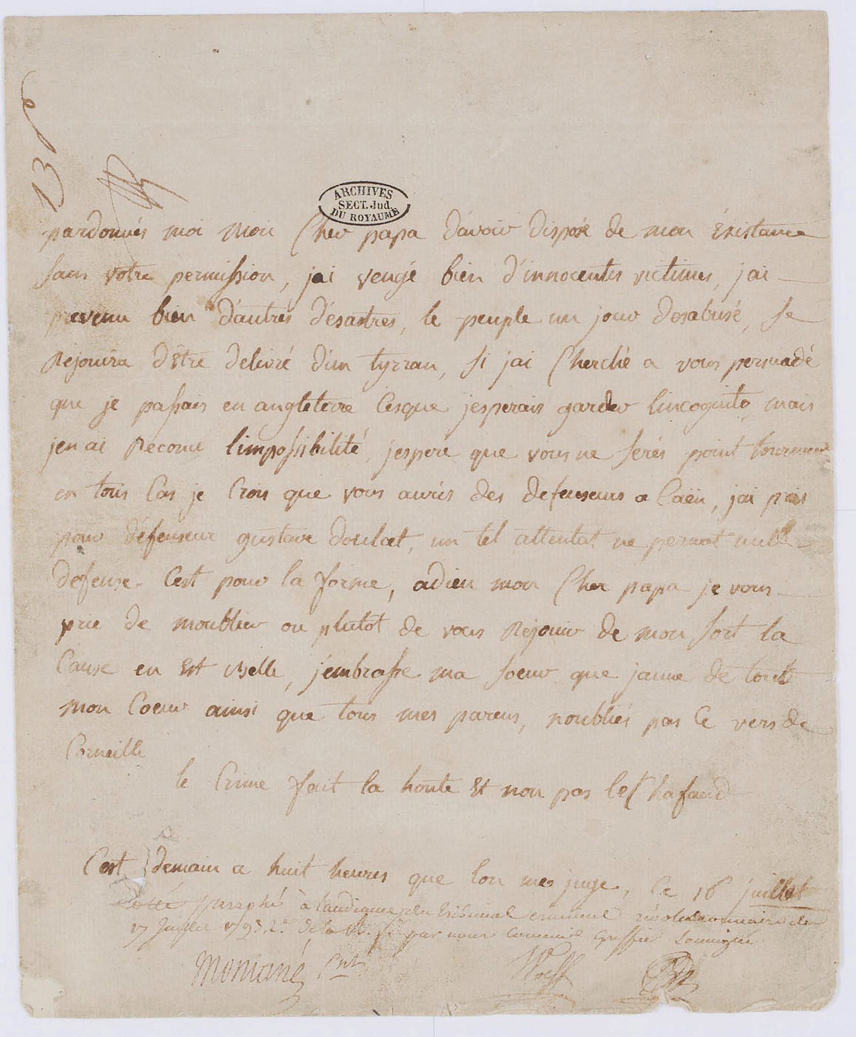 Lettre d'adieu autographe de Charlotte Corday à son père, du 16 juillet 1793, paraphé le 17 juillet par le tribunal criminel Révolutionnaire.